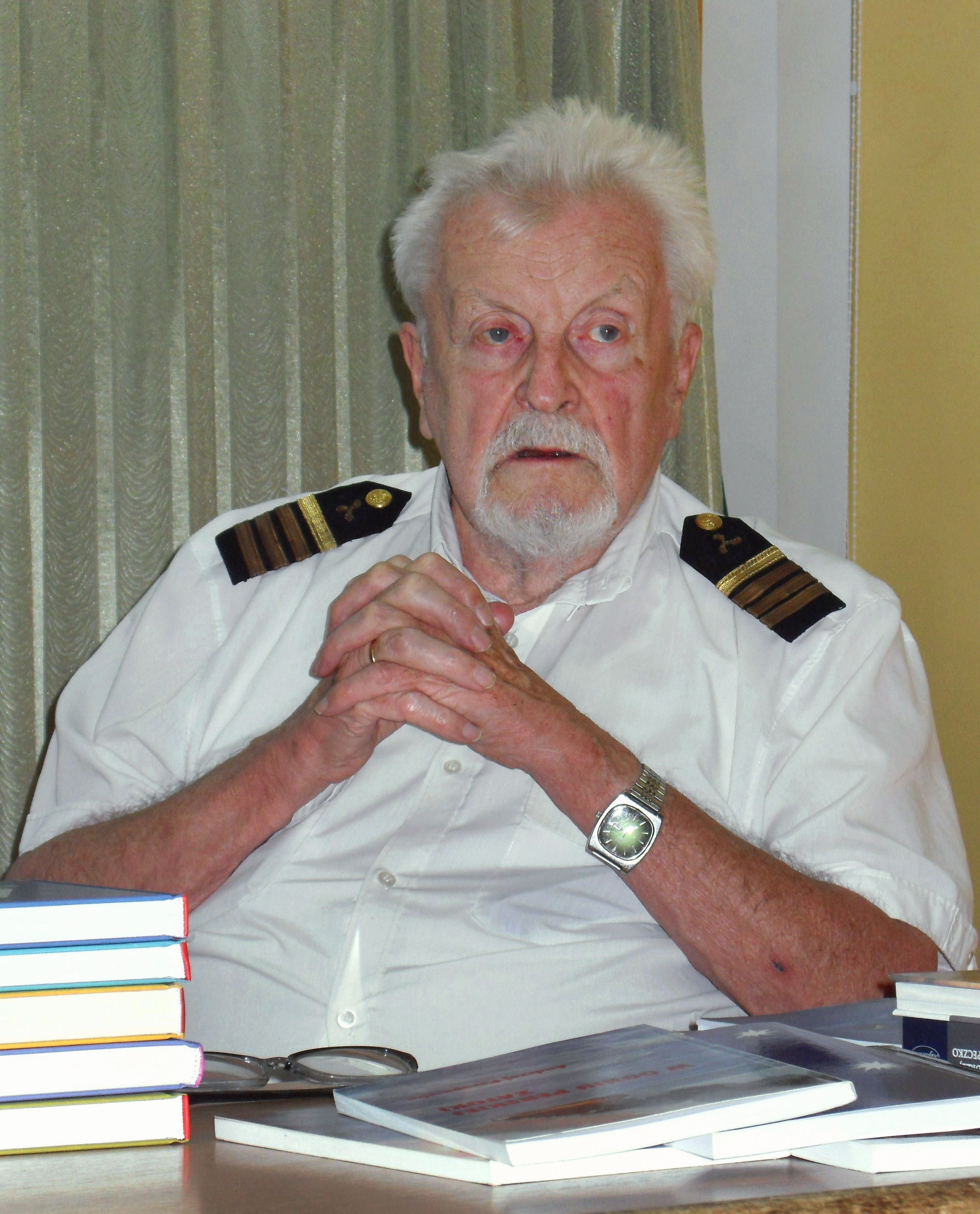 Andrzej Perepeczko, gdański pisarz i publicysta.